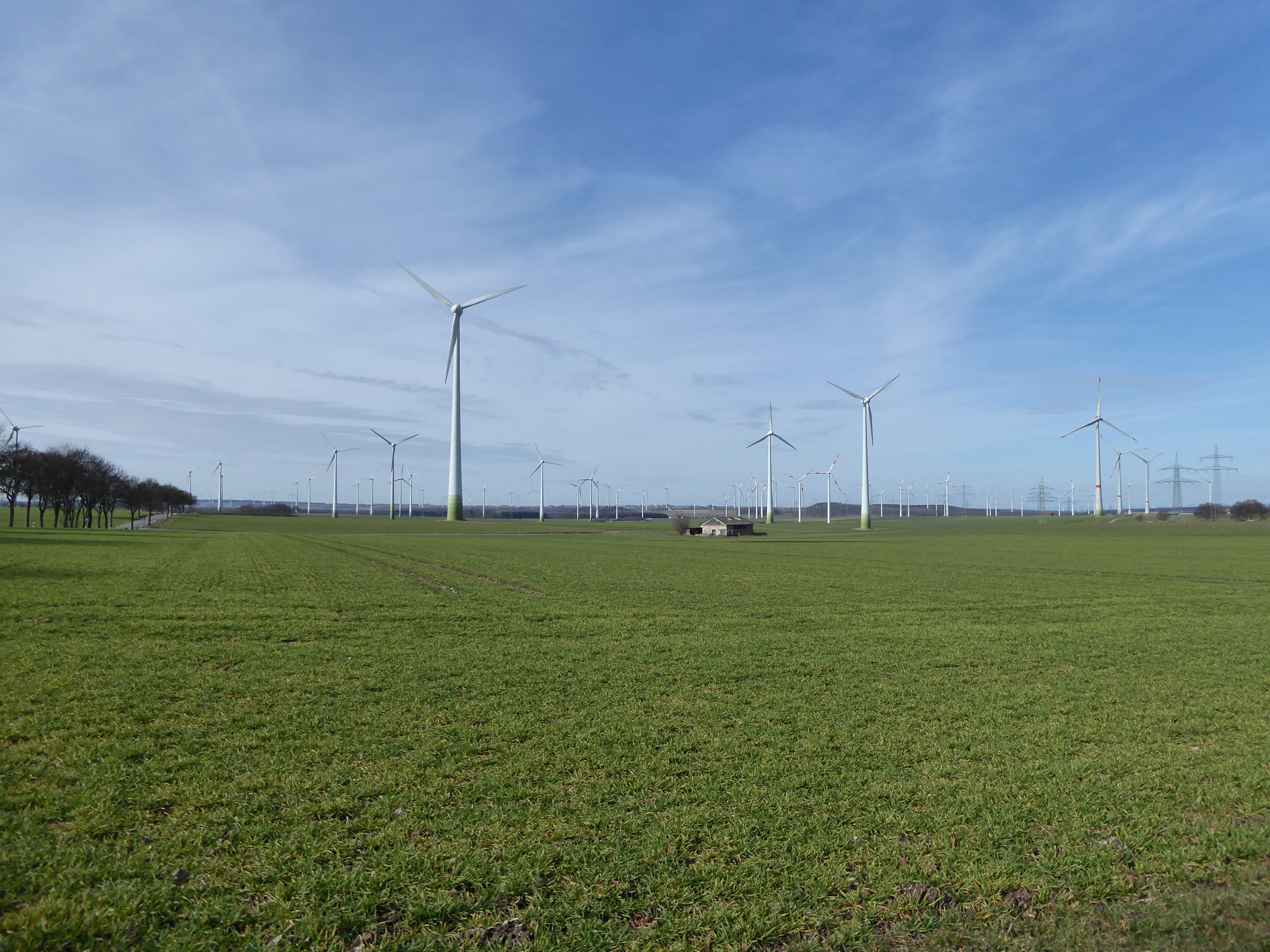 Windenergieanlagen verschiedener Hersteller in Meerhof, Teile von Windpark Sintfeld